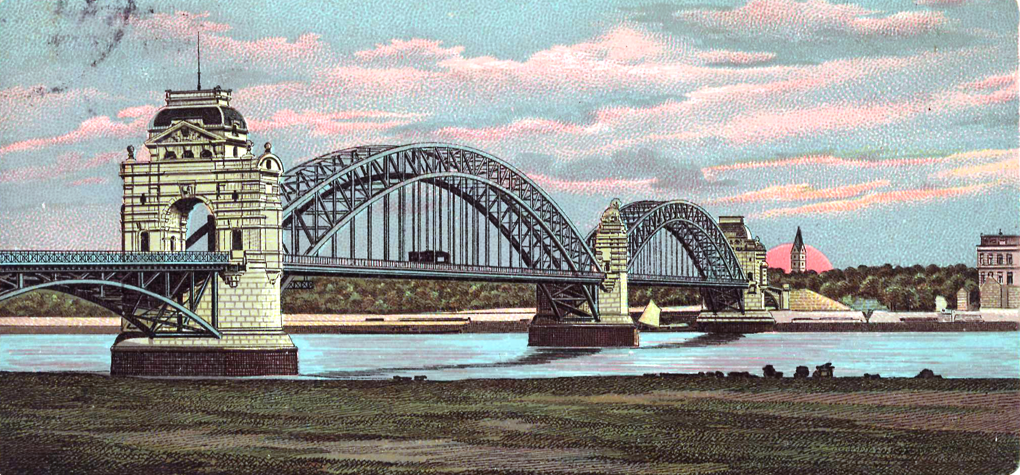 Oberkasseler Rheinbrücke Düsseldorf, Sicht von den Rheinwiesen Oberkassel (Postkarte Ausschnitt), 1902. Die beiden historistischen Tortürme und die Aufbauten des Mittelpfeilers mit der Figur des rheinaufwärts blickenden Bergischen Löwen, so wie das Brückengeländer, hatte der Düsseldorfer Architekt und Maler Adolf Schill entworfen